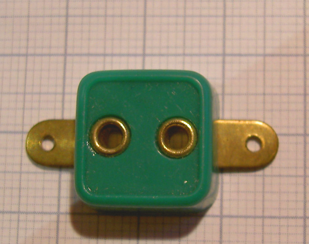 Schwachstrom Buchse für Puppenhäuser